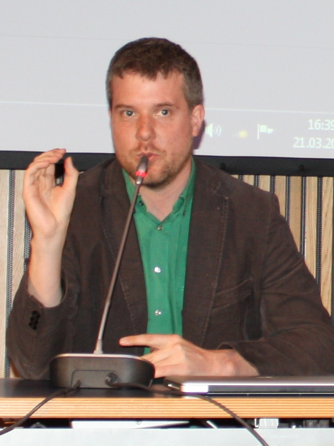 Dieter Janecek, Landesvorsitzender Bündnis 90/Die Grünen Bayern